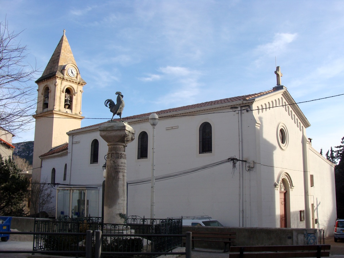 La place du monument et l'église Saint-Dominique, quartier de la Pomme, Marseille (11e arr.)